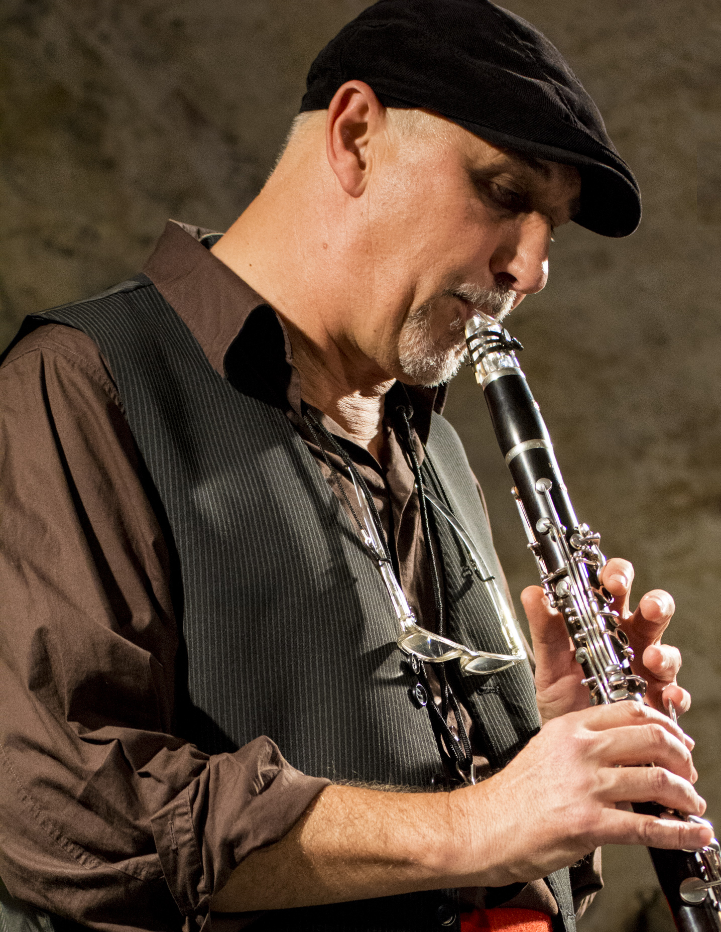 Michel Pellegrino en quartet au Fort Napoléon à La Seyne